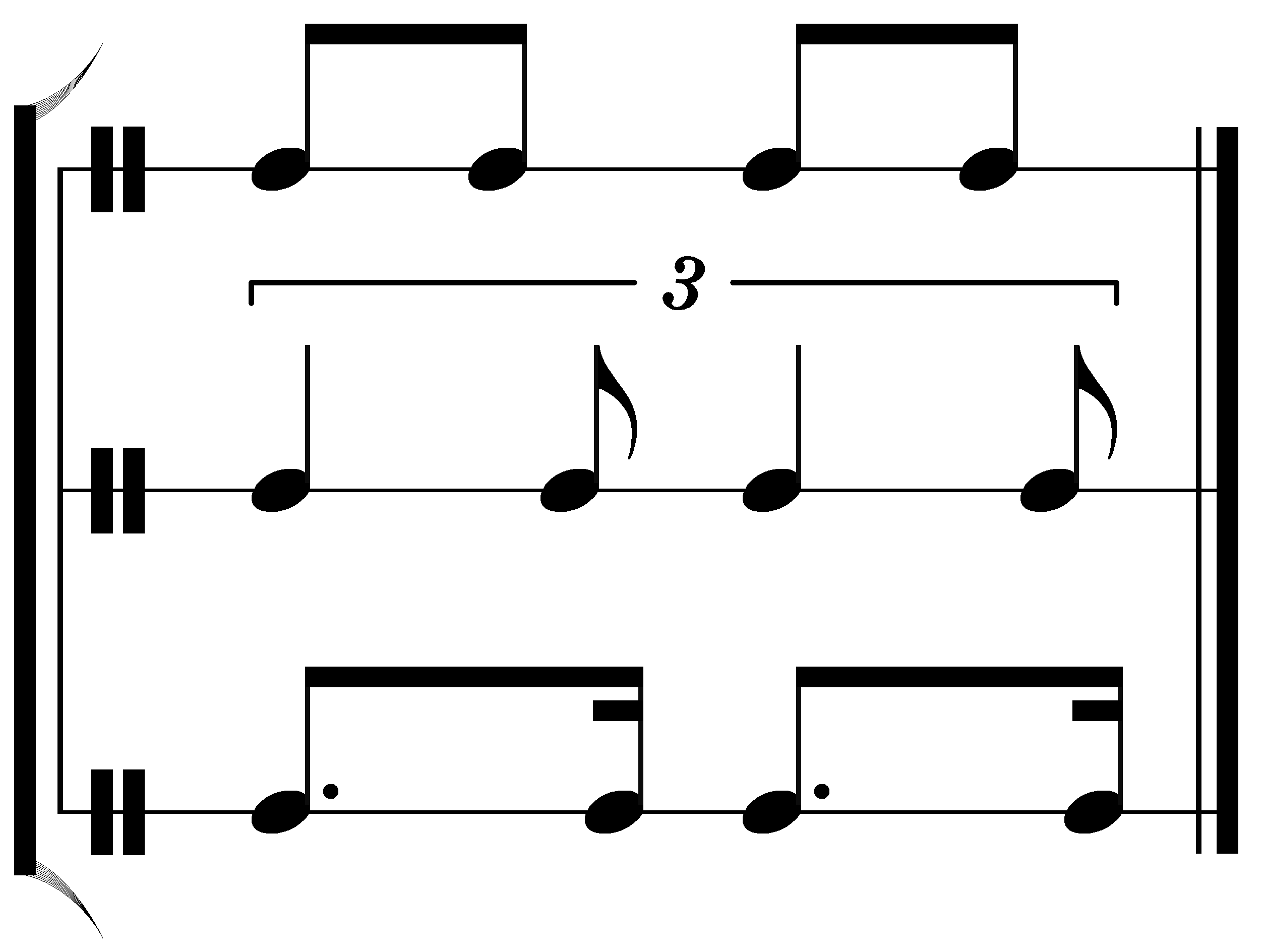 Triolenfeeling vs. Punktierung